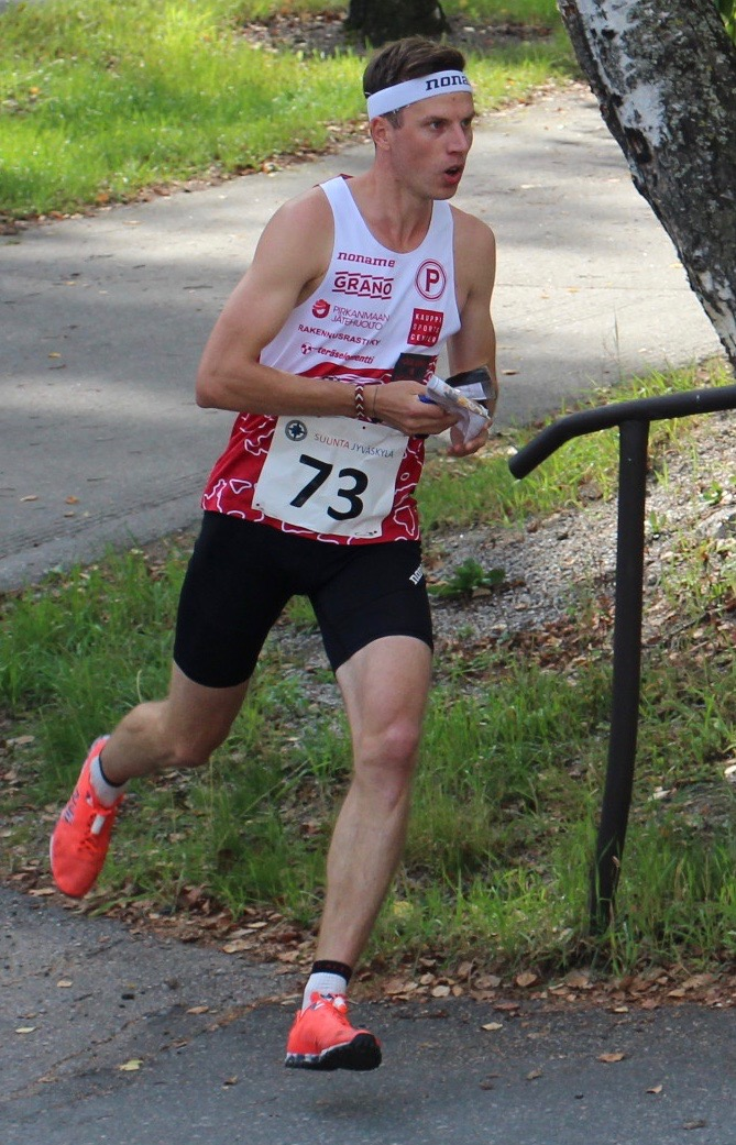 Otto Simosas Jyvässprintissä 31.8.2019